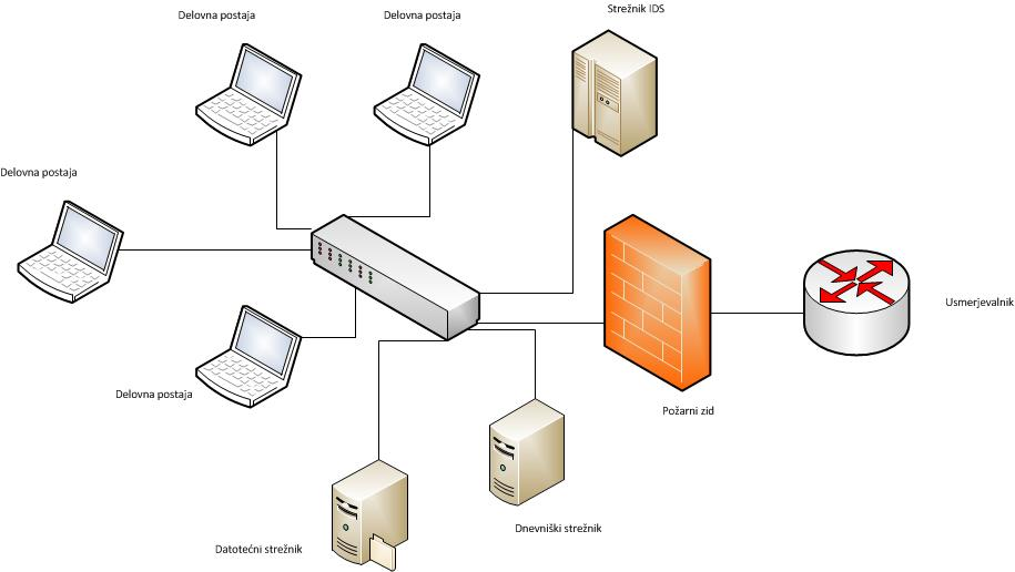 IDS sistem